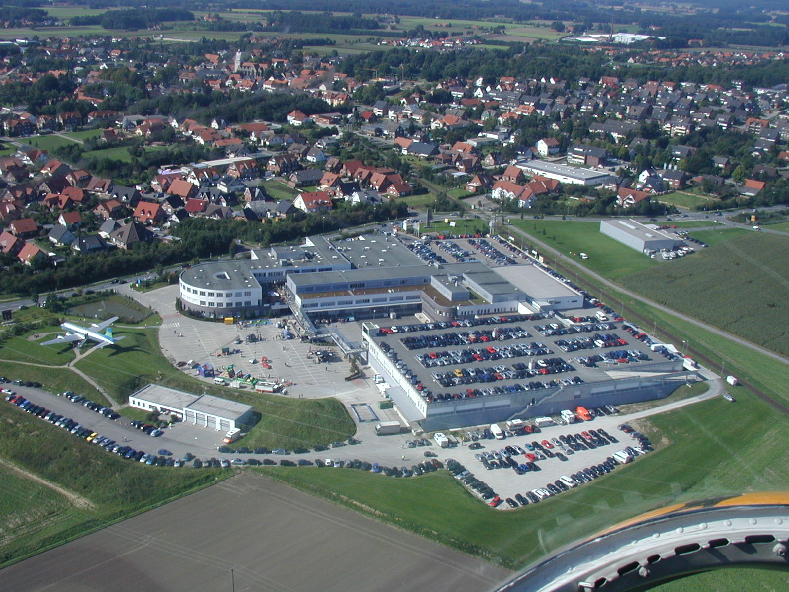 Der Standort der SANICARE-Versandapotheke in Bad Laer